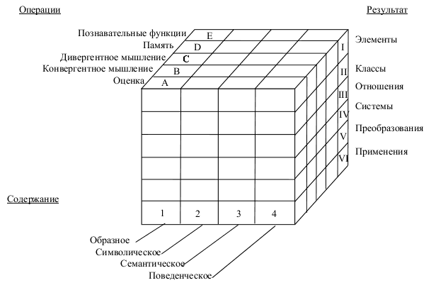 Модель структуры интеллекта Гилфорда